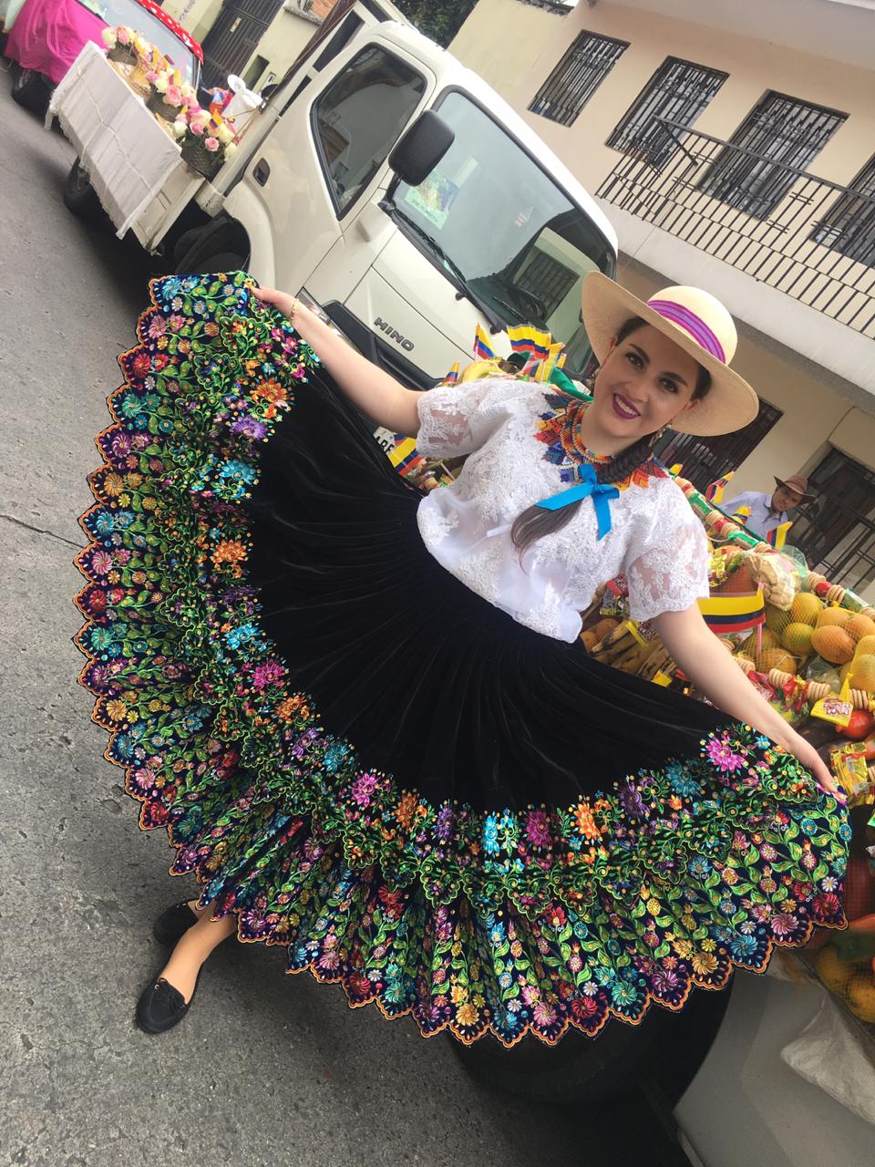 Icono de la tradición cuencana